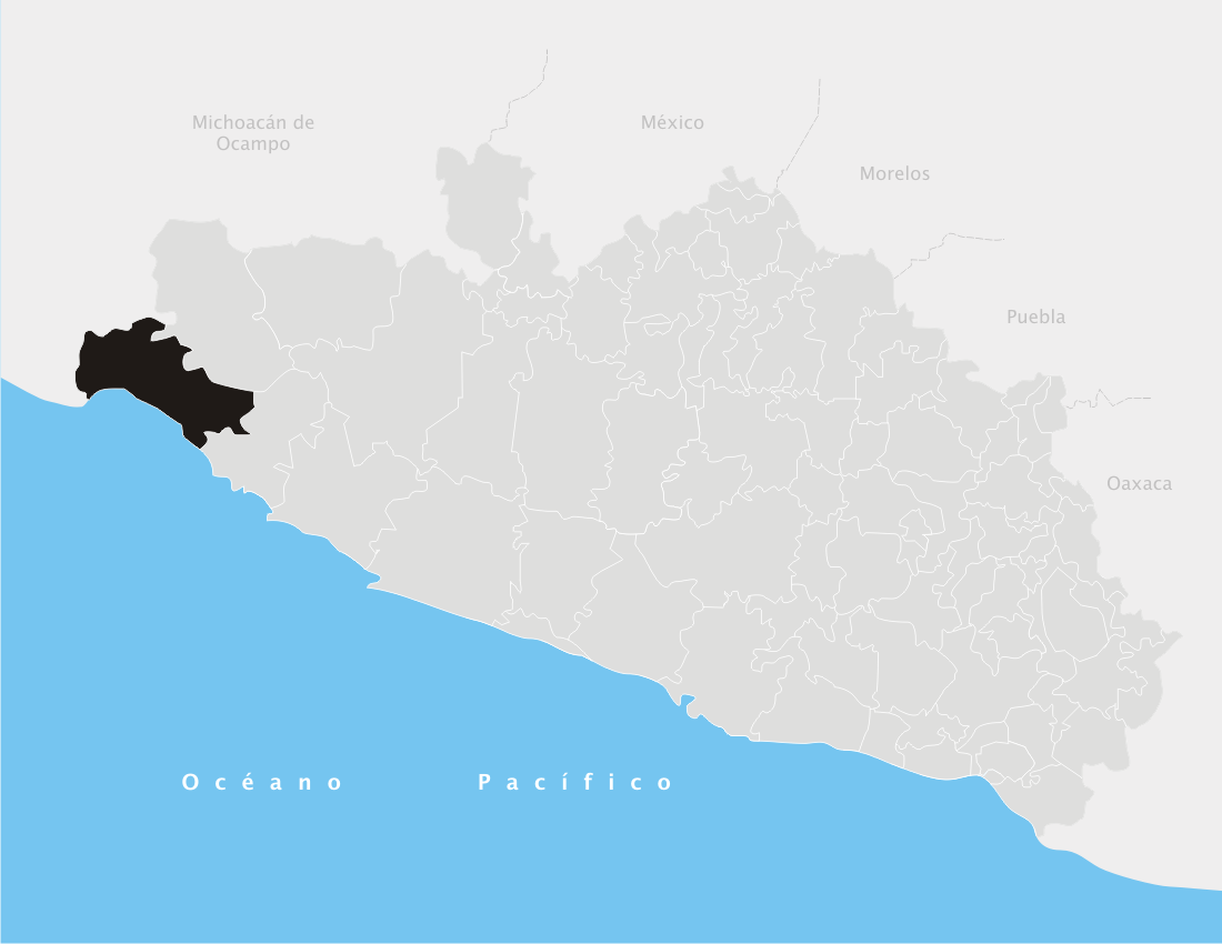 La Unión de Isidoro Montes de Oca en el estado de Guerrero (México)